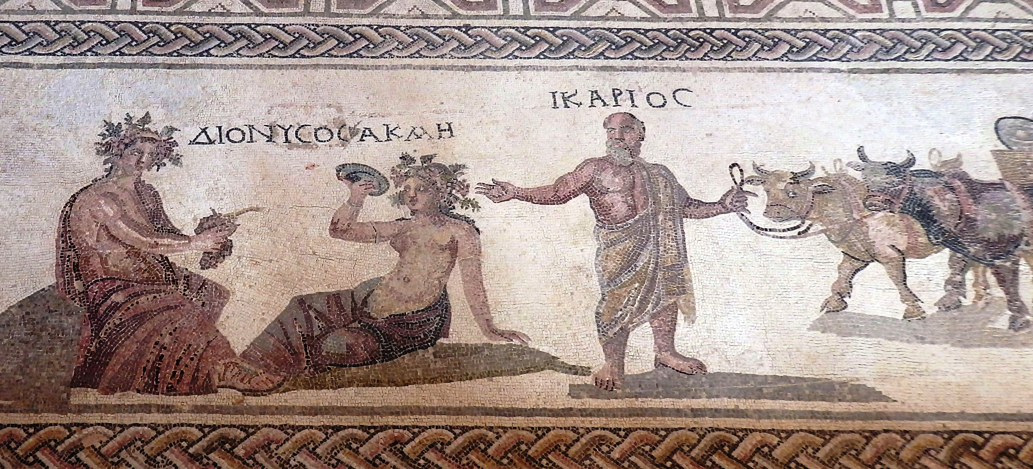 Mosaik mit Ikarios und Dionysos, Haus des Dionysos, Paphos